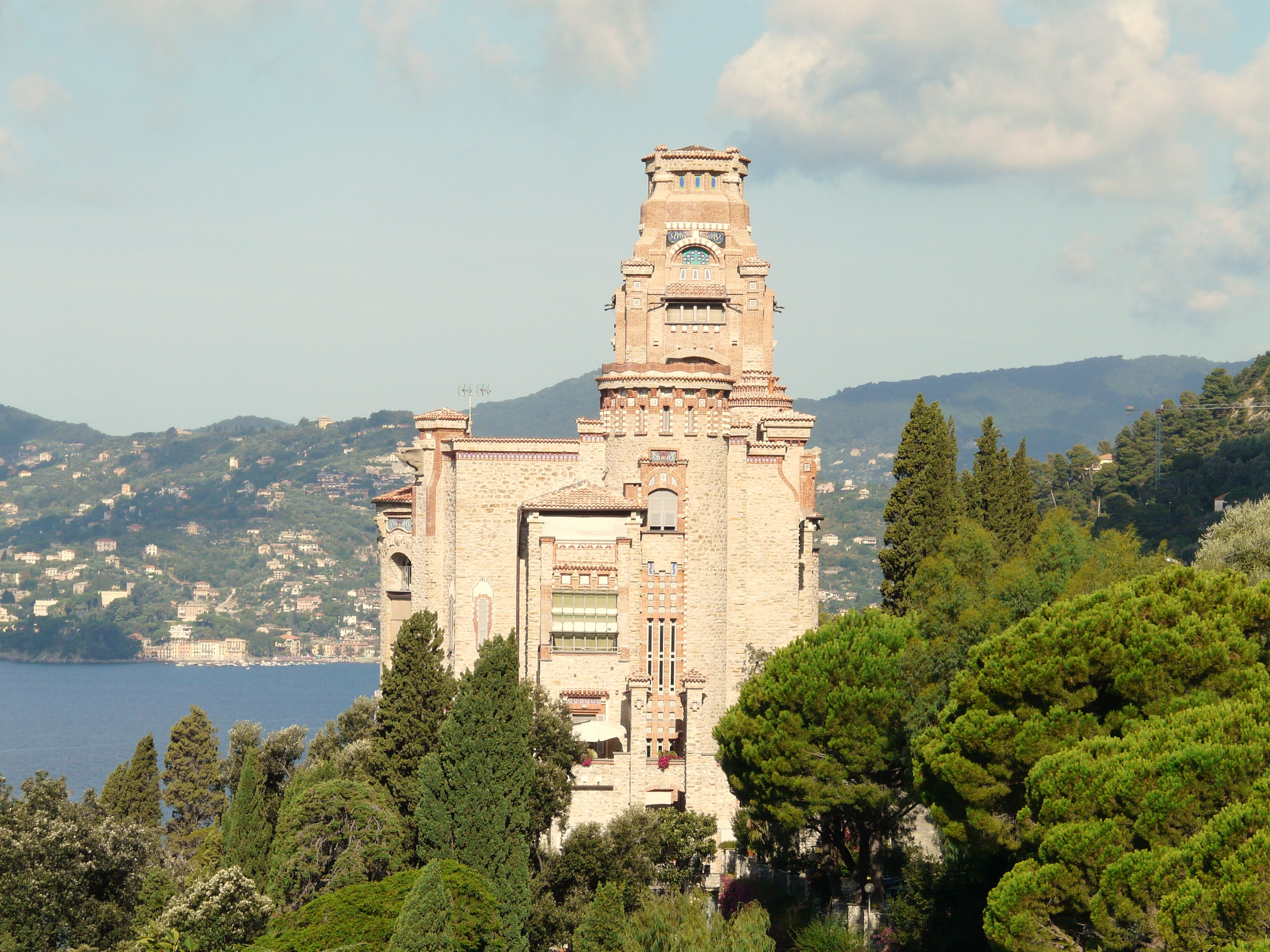 Castello di Sem Benelli, Zoagli, Liguria, Italia